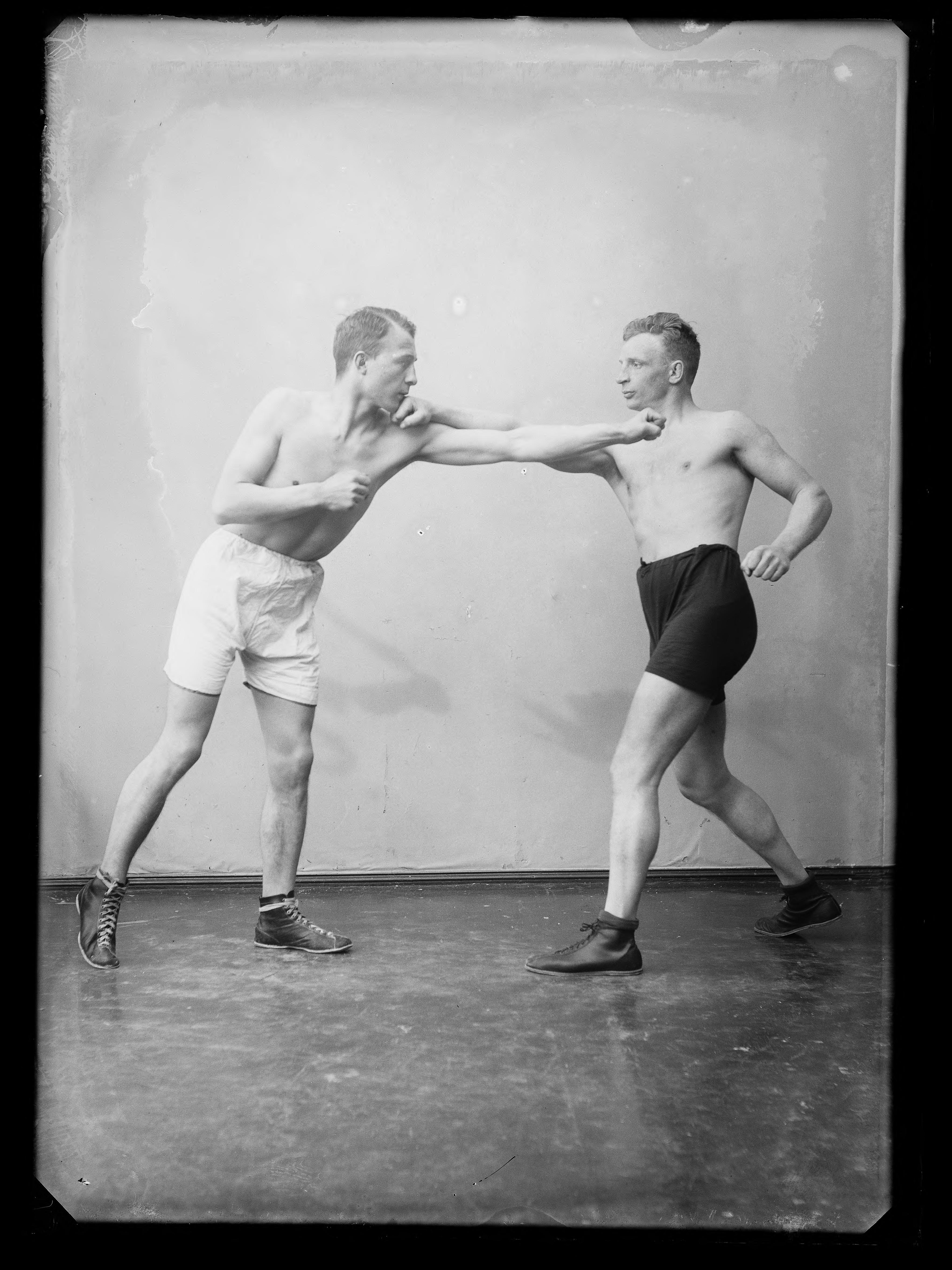 Bildet er hentet fra Nasjonalbibliotekets bildesamling. Anmerkninger til bildet var: Påskrift arkivark: Hr. Georg Brustad Arkivnummer: 451. Georg Brustad til høyre. Depicted person: Brustad, Georg